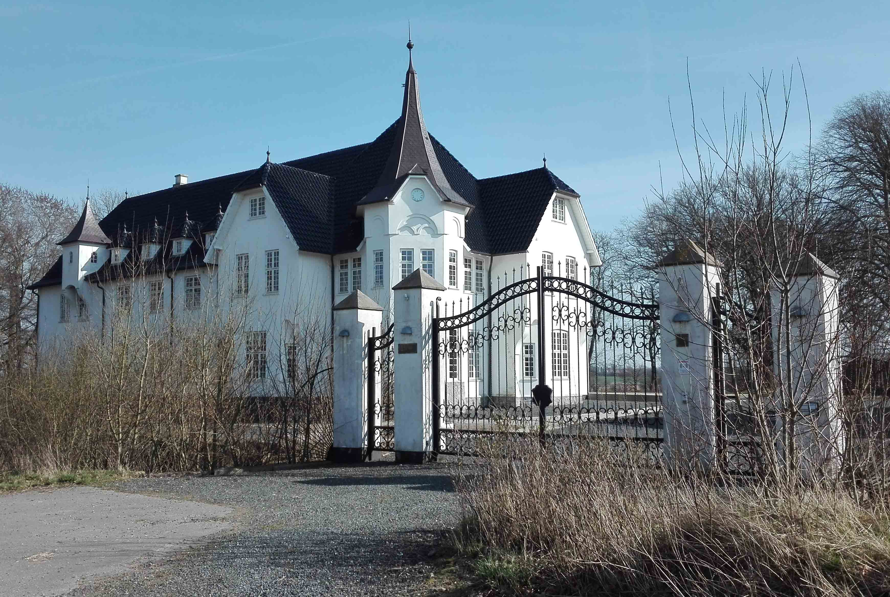 Herregården Grøngrøft